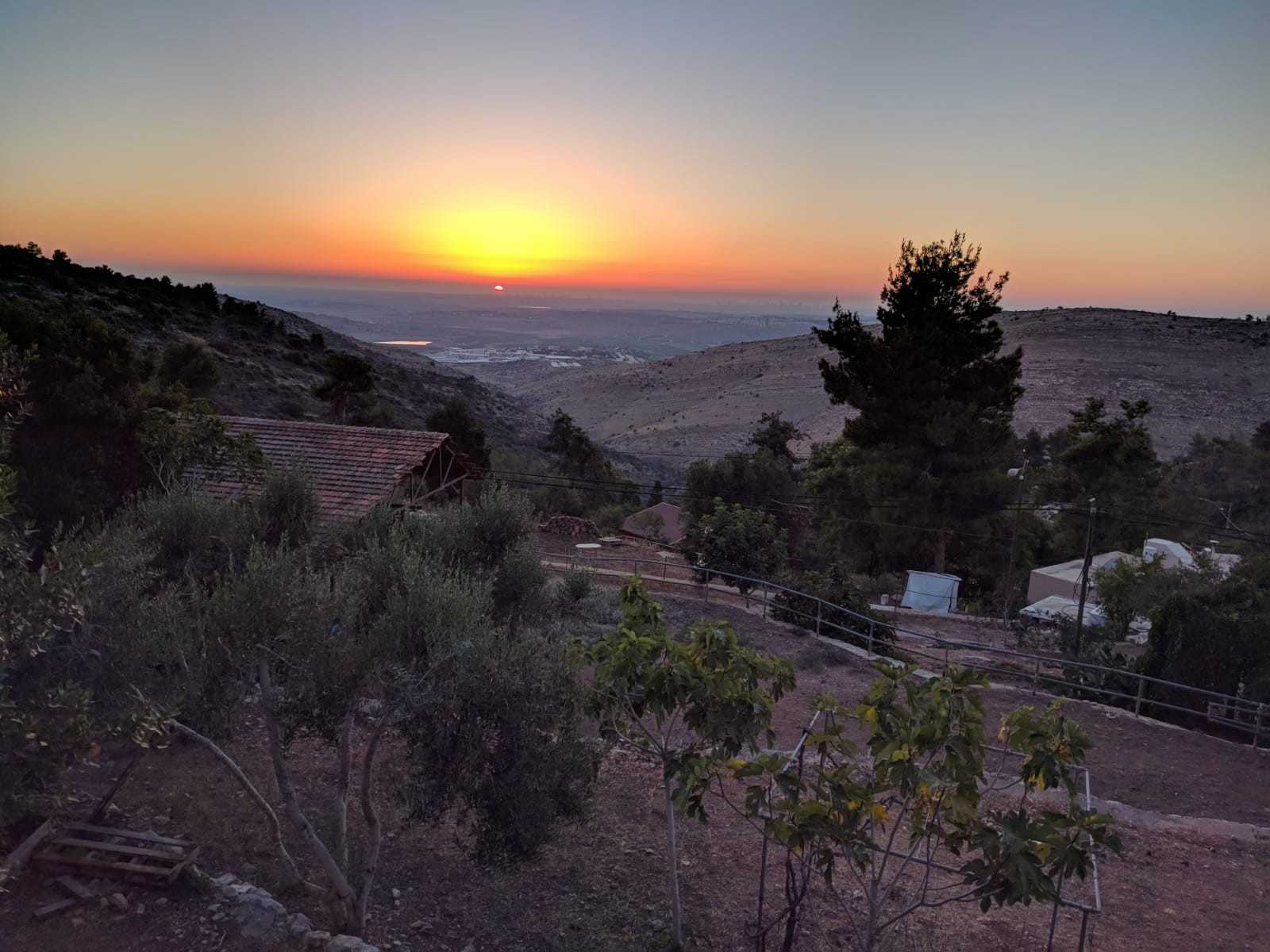 מראה של הישוב נטף בשקיעה